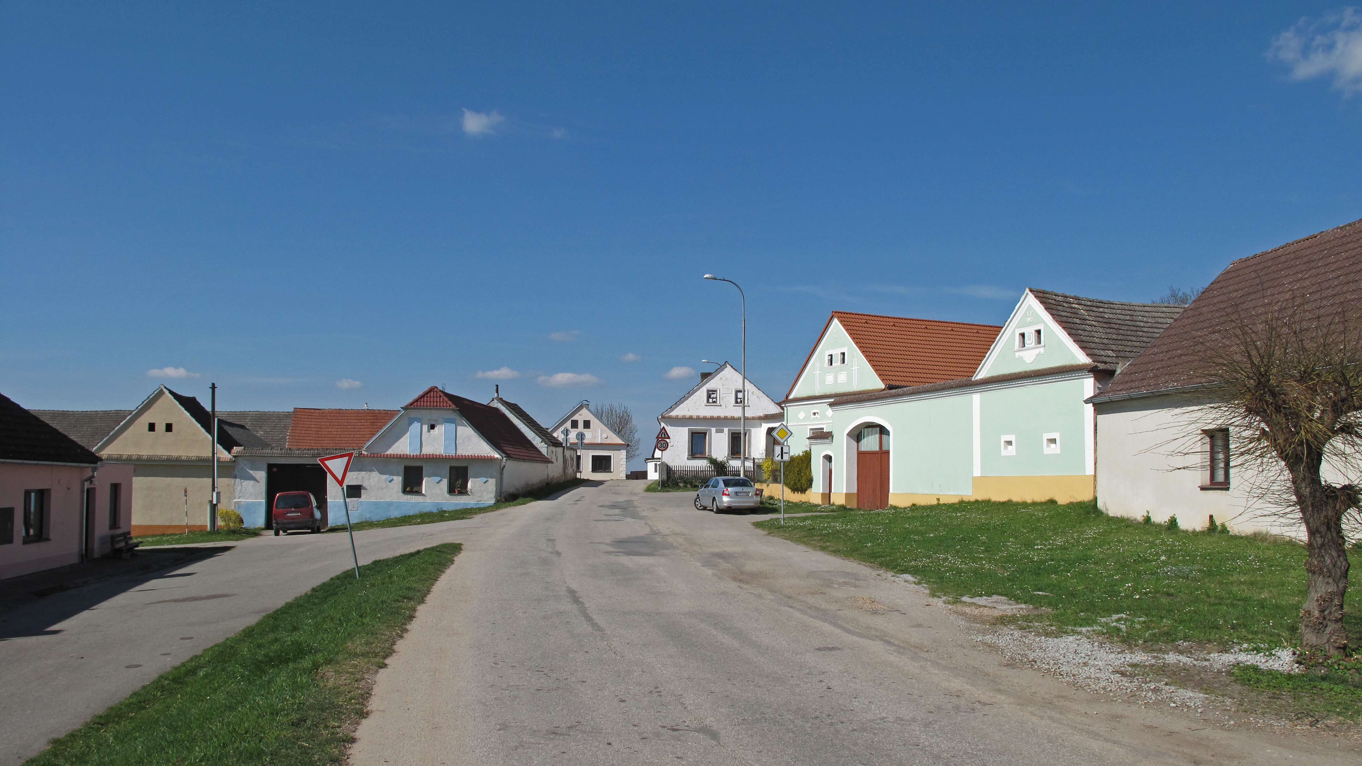 Statky v Dobšicích. Okres České Budějovice, Česká republika.